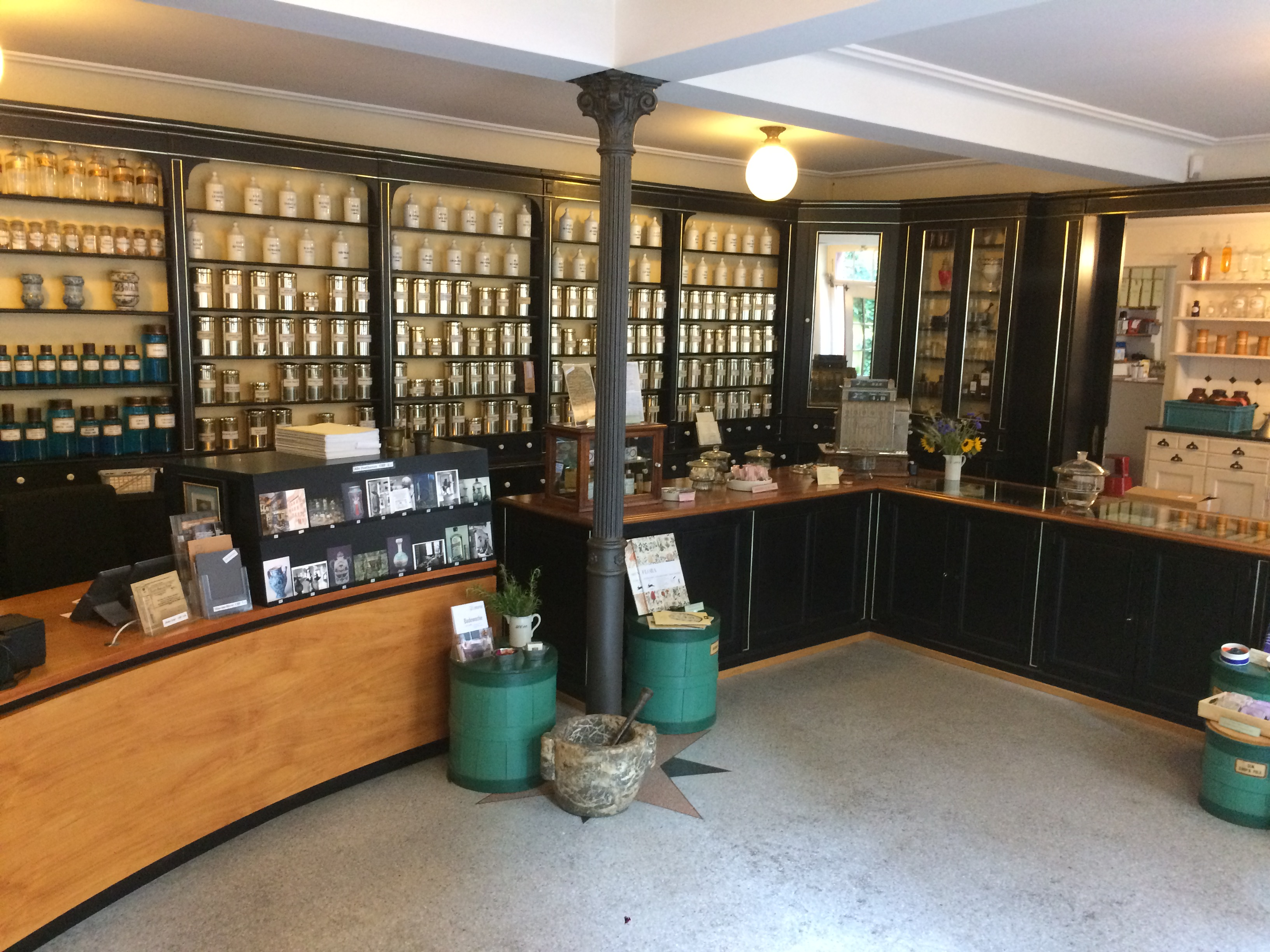 Museumsladen